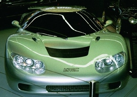 Lotec Sirius auf der AutoRAI Amsterdam, 2003